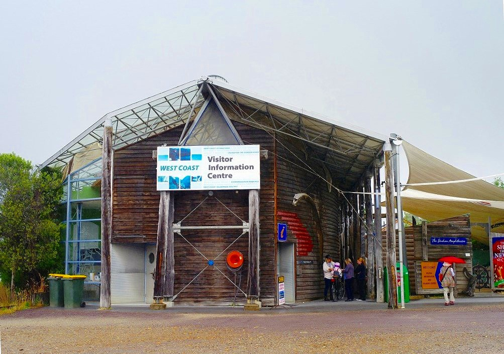 オーストラリア、ストラーン、ビジターセンター